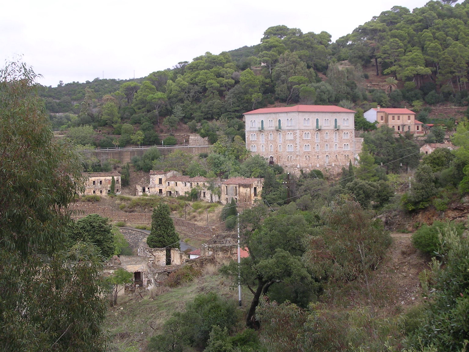 Panorama di Ingurtosu con il palazzo della direzione della miniera